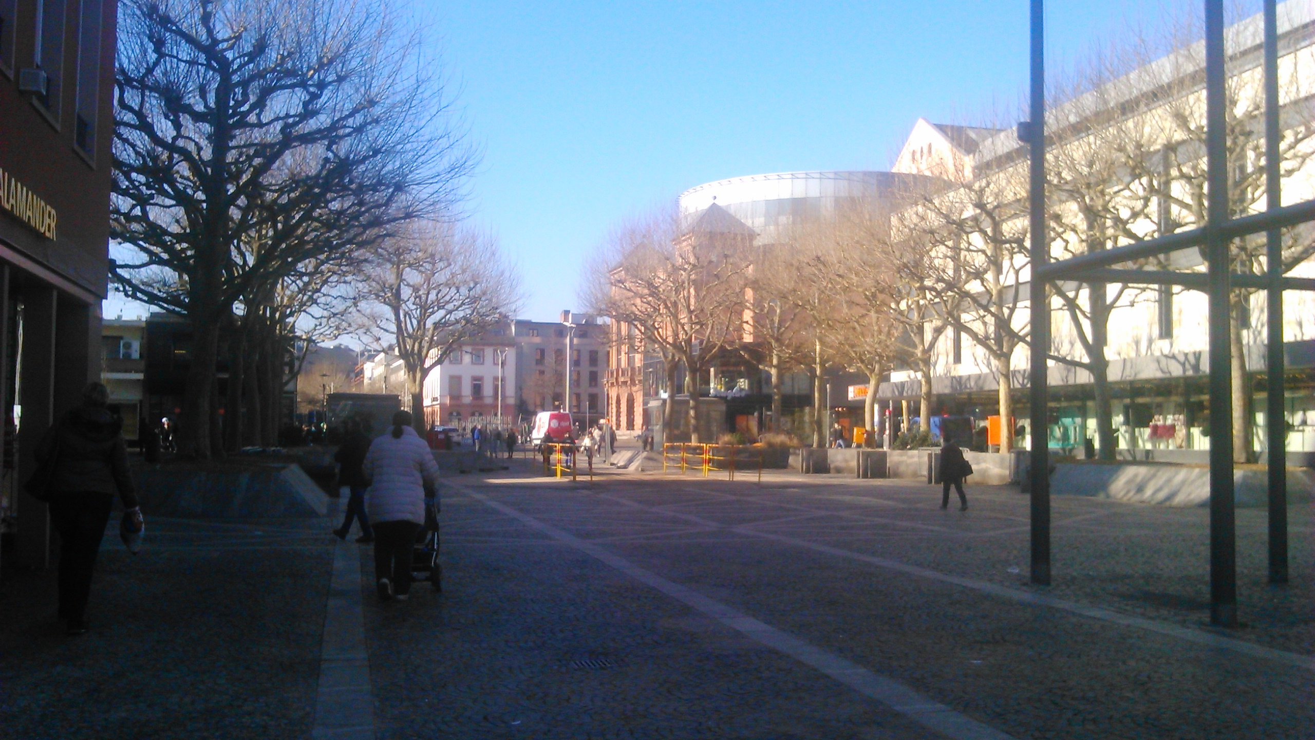 Blick auf das Höfchen in Mainz vom Marktplatz. Im Hintergrund ist das Staatstheater zu sehen.